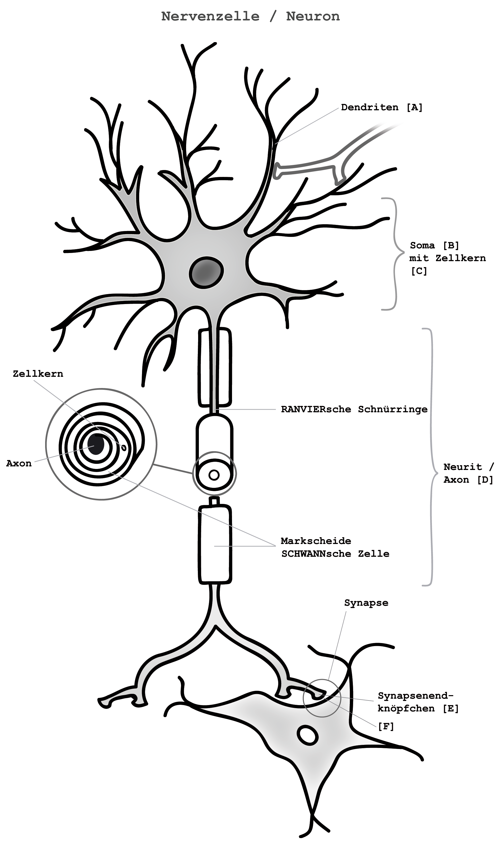 Schemazeichnung einer myelinisierten Wirbeltier-Nervenzelle.